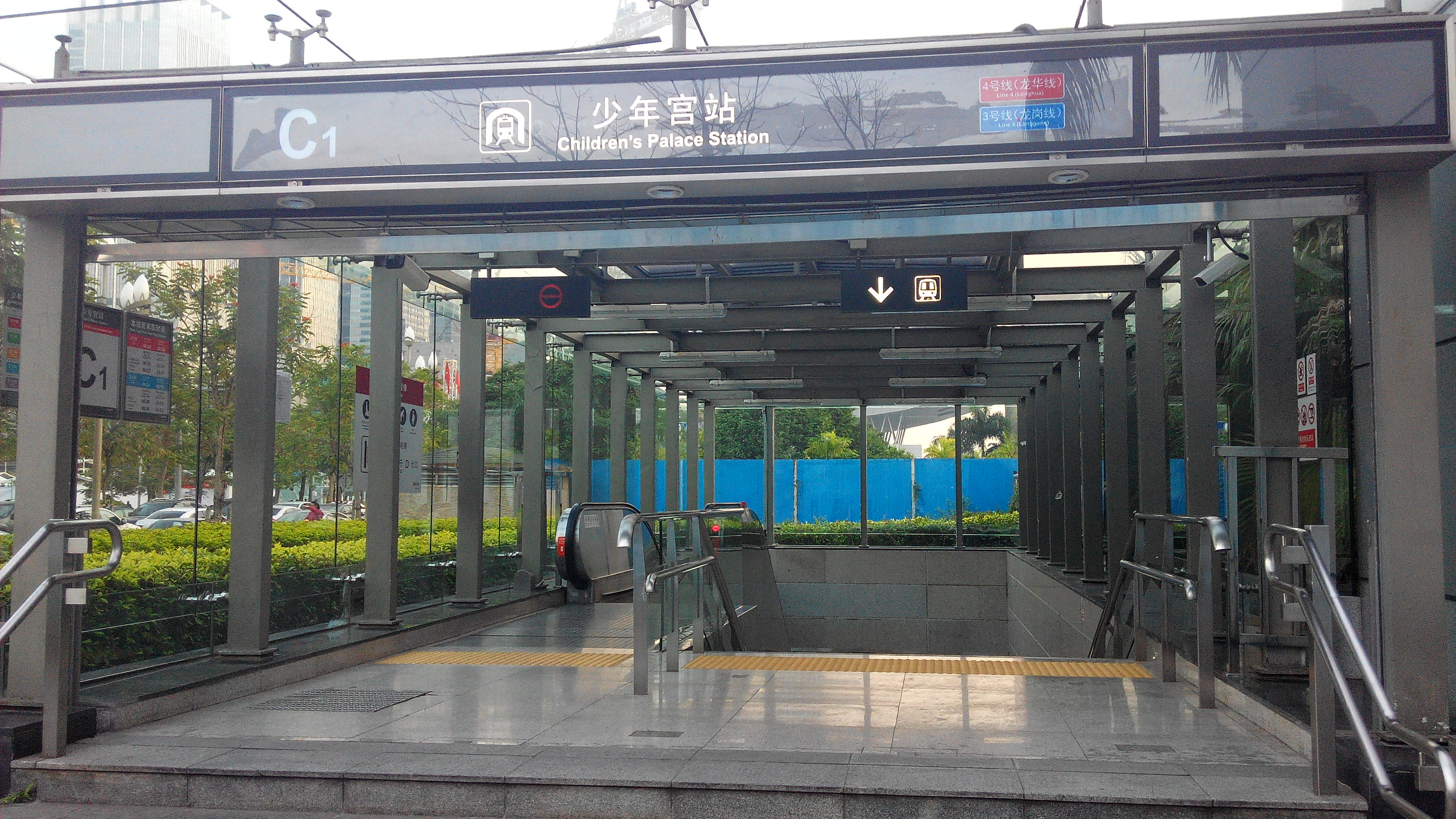 深圳地铁3、4号线少年宫站C1出口